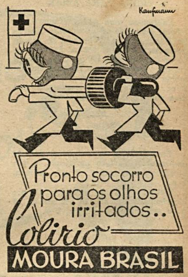 Propaganda do Colírio Moura Brasil, em 1944.